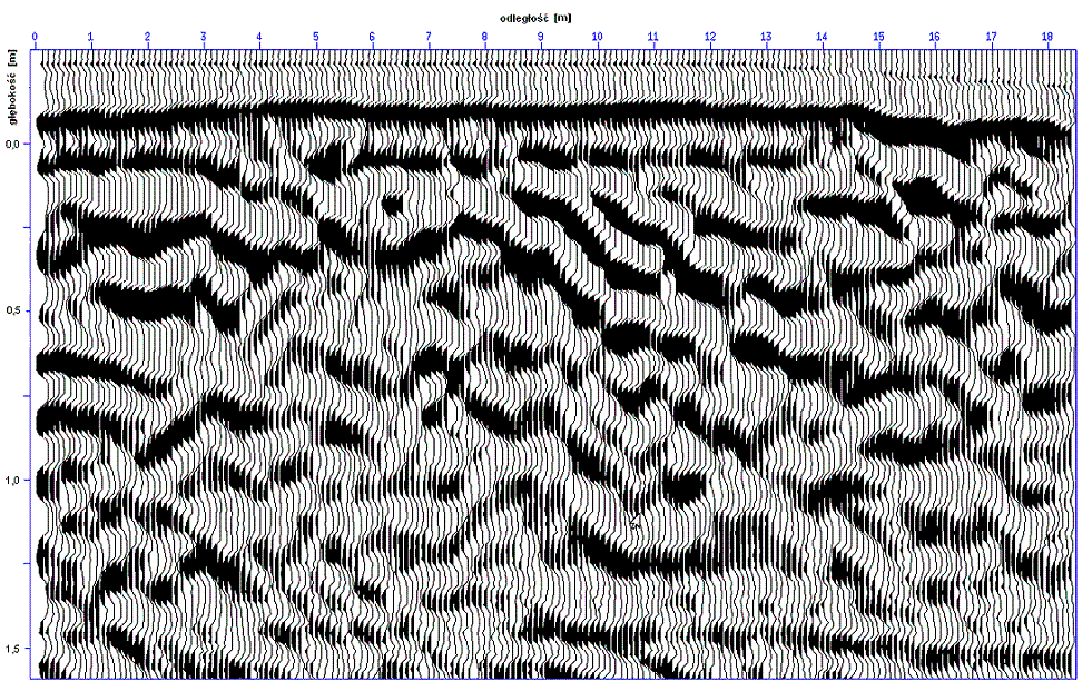 Profil georadarowy: żwirowe osady łachy meandrowej, brzeg rzeki po lewej stronie od profilu (zauważ przekątne warstwowanie).